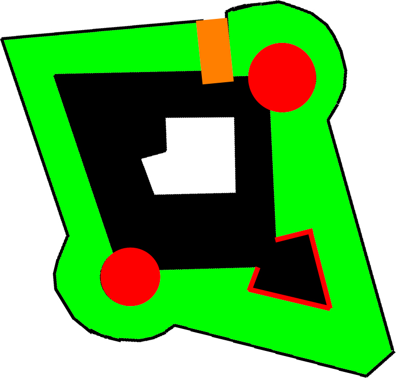 castello acaya visto dall'alto